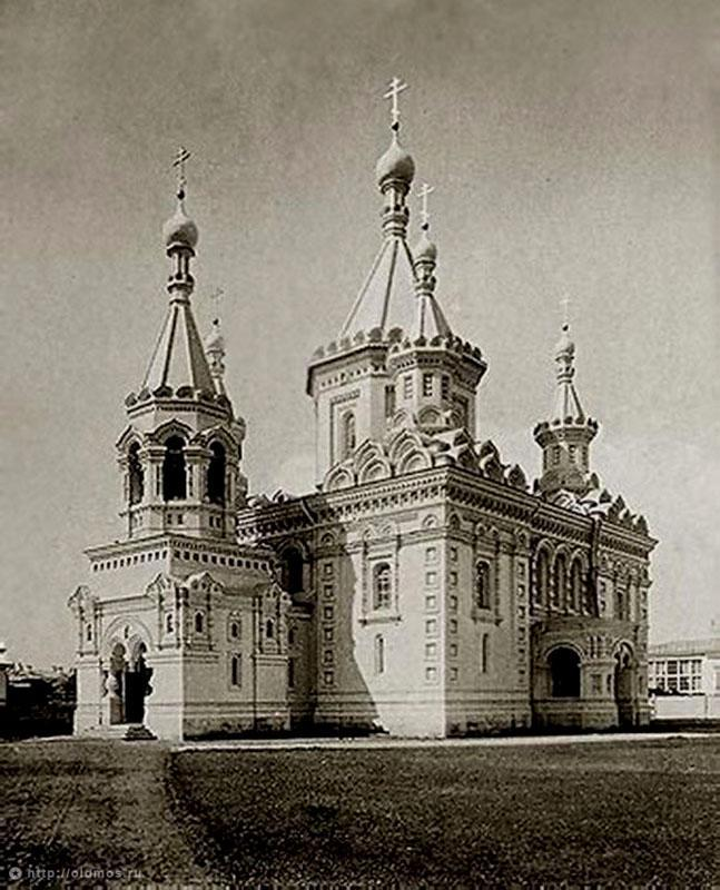 Большая пятишатровая церковь была построена архитекторами А. Ф. Мейснером и А. А. Никифоровым в 1894—1897 гг. как главный храм Клинического городка Московского университета на Девичьем поле.